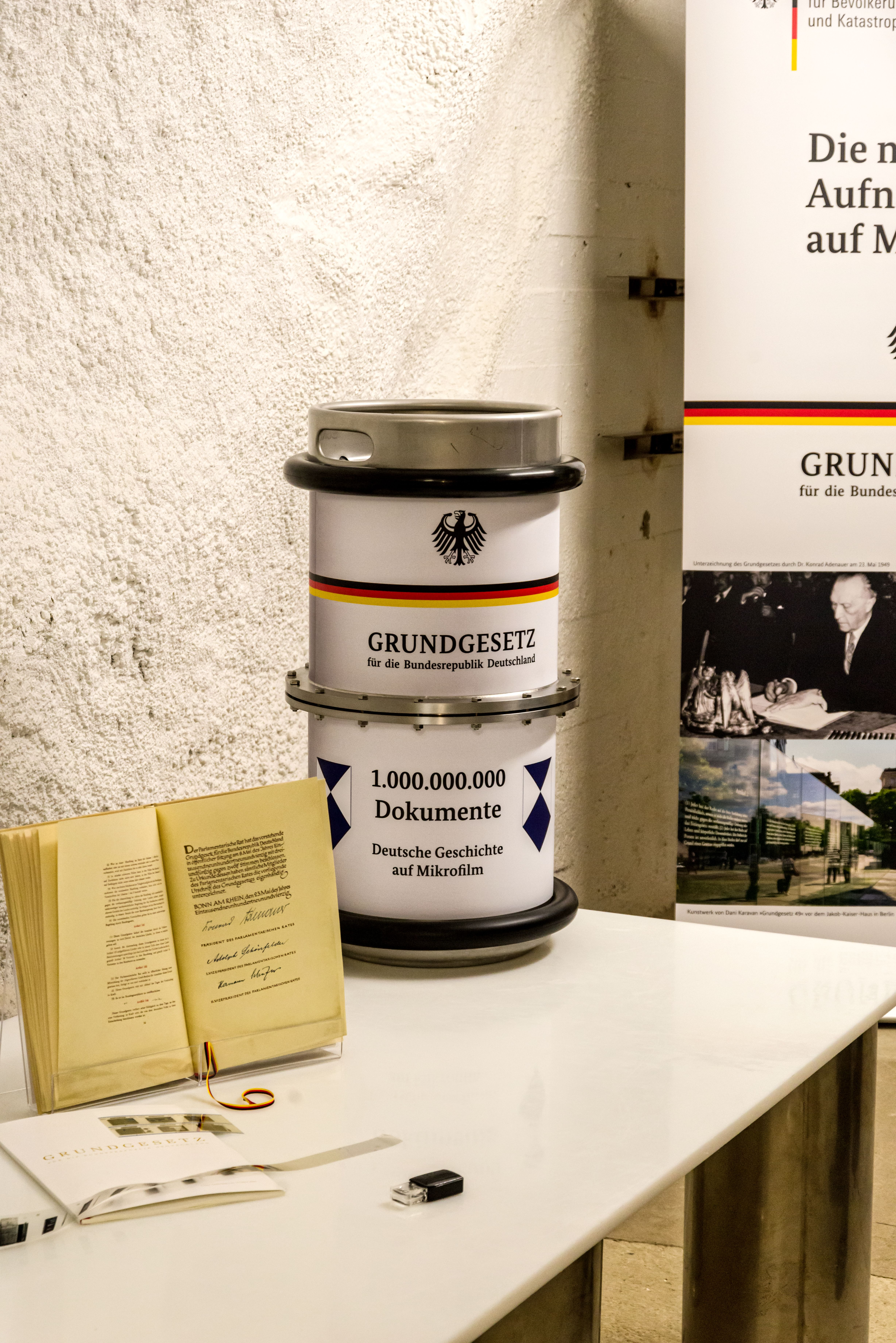 Die Einlagerung der Dokumente zum Grundgesetz und des Originals des „Grundgesetzes für die Bundesrepublik Deutschland“ als Mikrofilm am 3. Oktober 2016. Das Grundgesetz ist das 1.000.000.000 Dokument (Bild) das eingelagert wurde. Der Behälter 2165 mit dem Grundgesetz, dem 1.000.000.000 Bild der Archivs, ein Faksimile des Grundgesetzes, die Seite mit den Unterschriften, ein Archivfilm und eine Lupe 6×